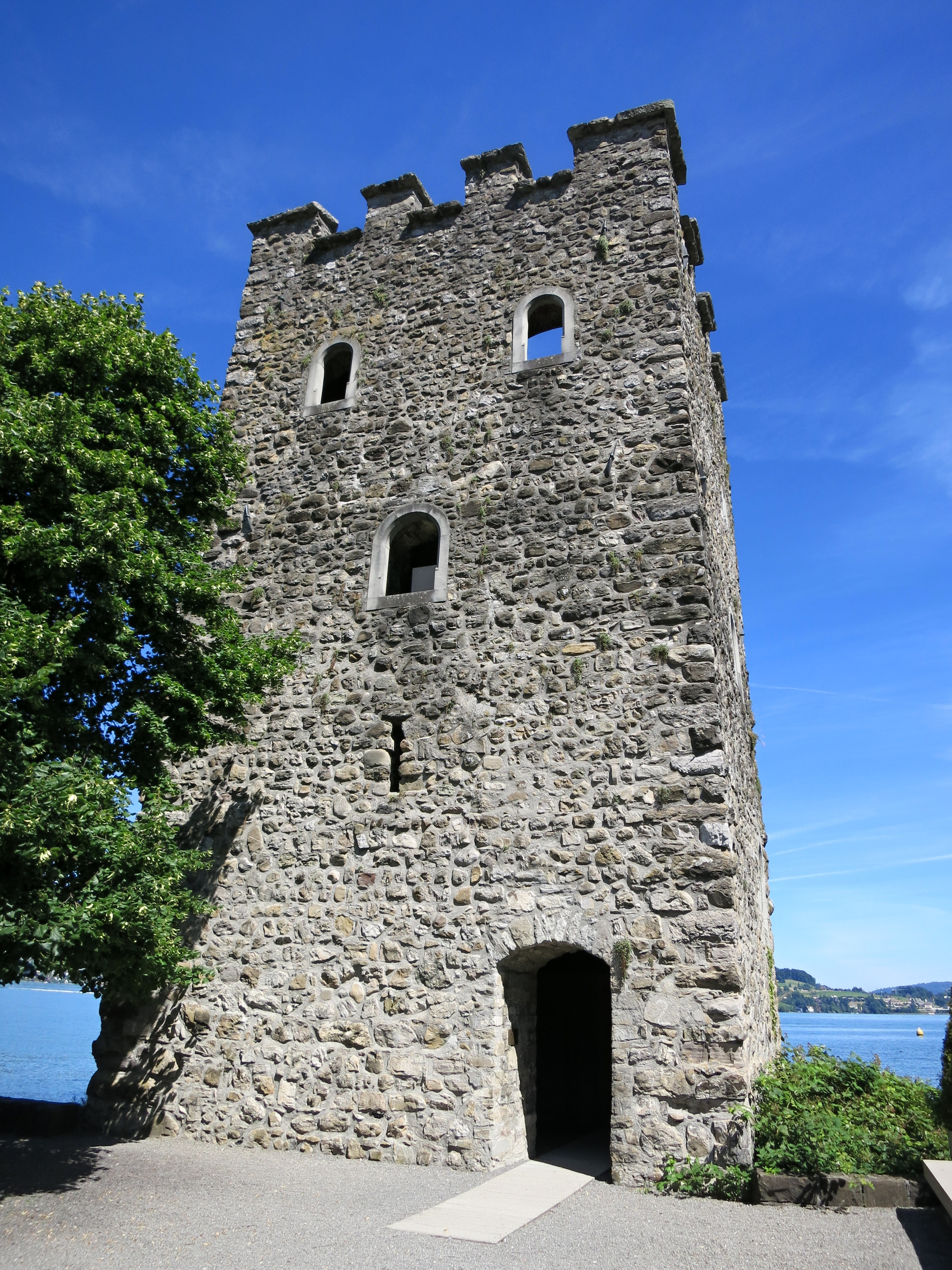 Schnitzturm